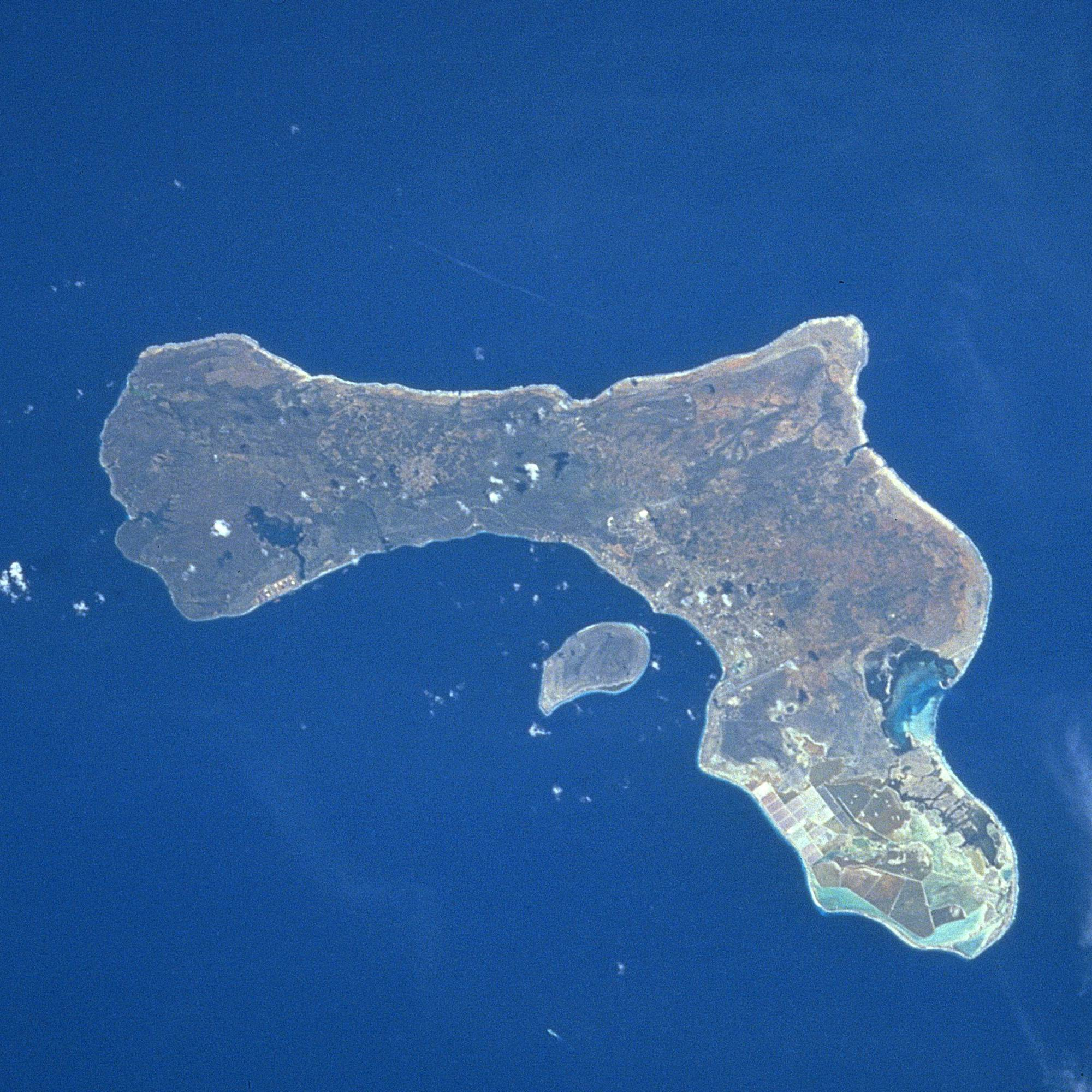 Bonaire Aufnahmedaten: Mission: STS075 Roll: 706 Frame: 41 Mission ID on the Film or image: STS75 (Nord bei 11 Uhr)